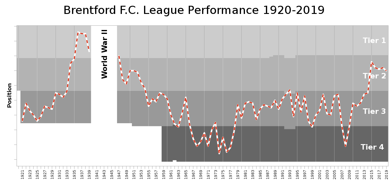 Posiciones del Brentford durante las temporadas en la Football League